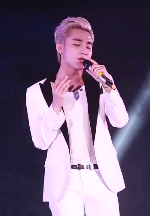 Sơn Tùng M-TP hát Chín bậc tình yêu tại đêm nhạc An Thuyên 27s